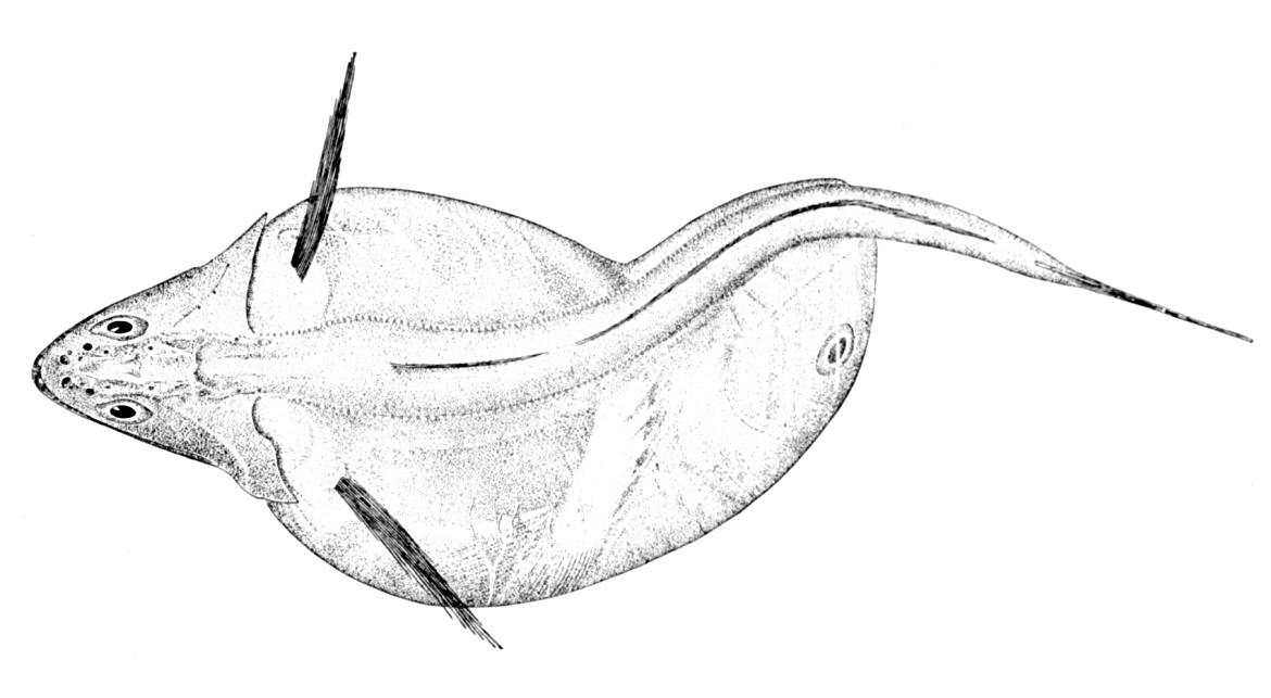 Chiasmodon niger